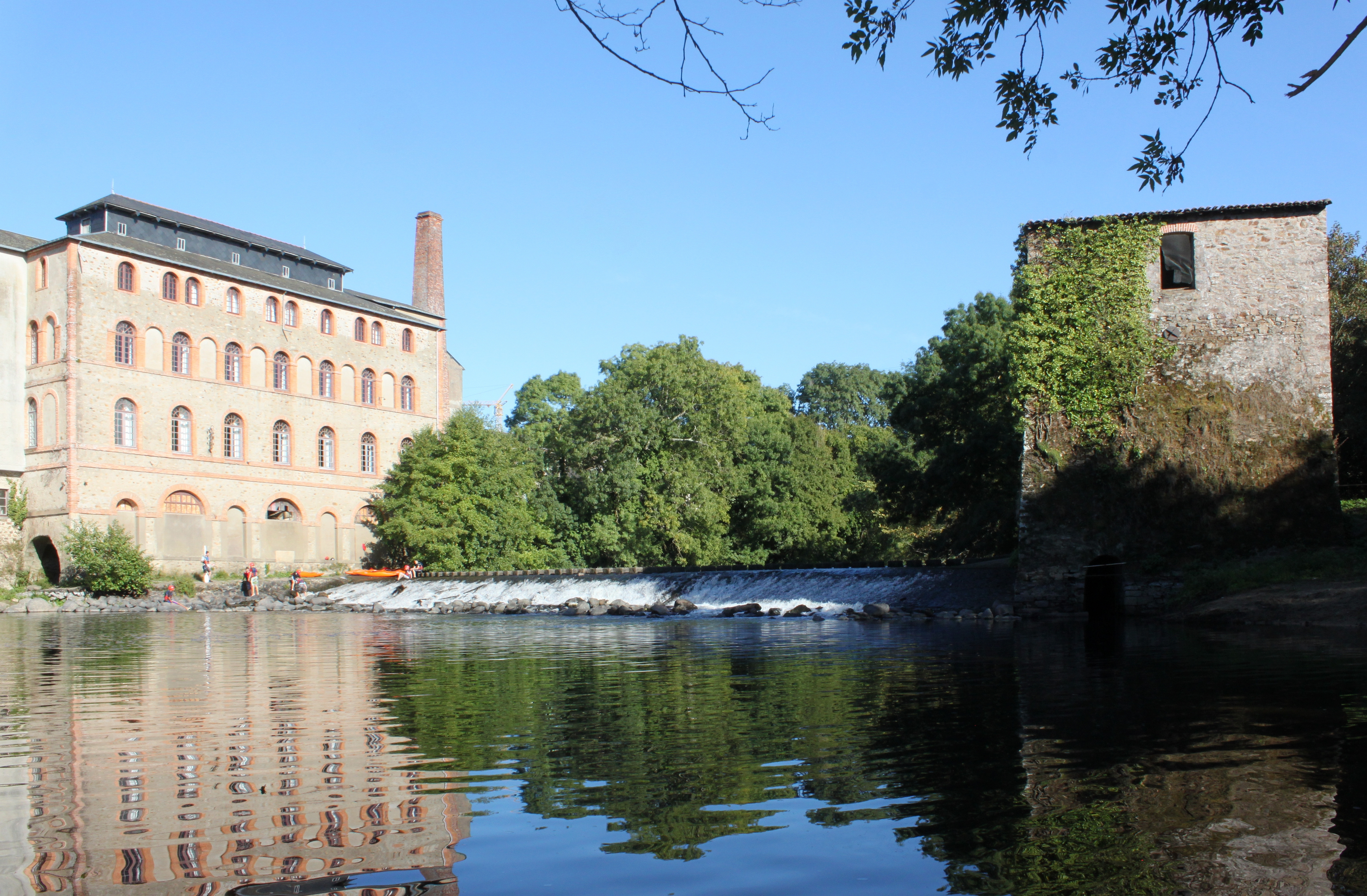 L'ancienne filature, le moulin et la chaussée, Angreviers, Fr-44-Gorges.